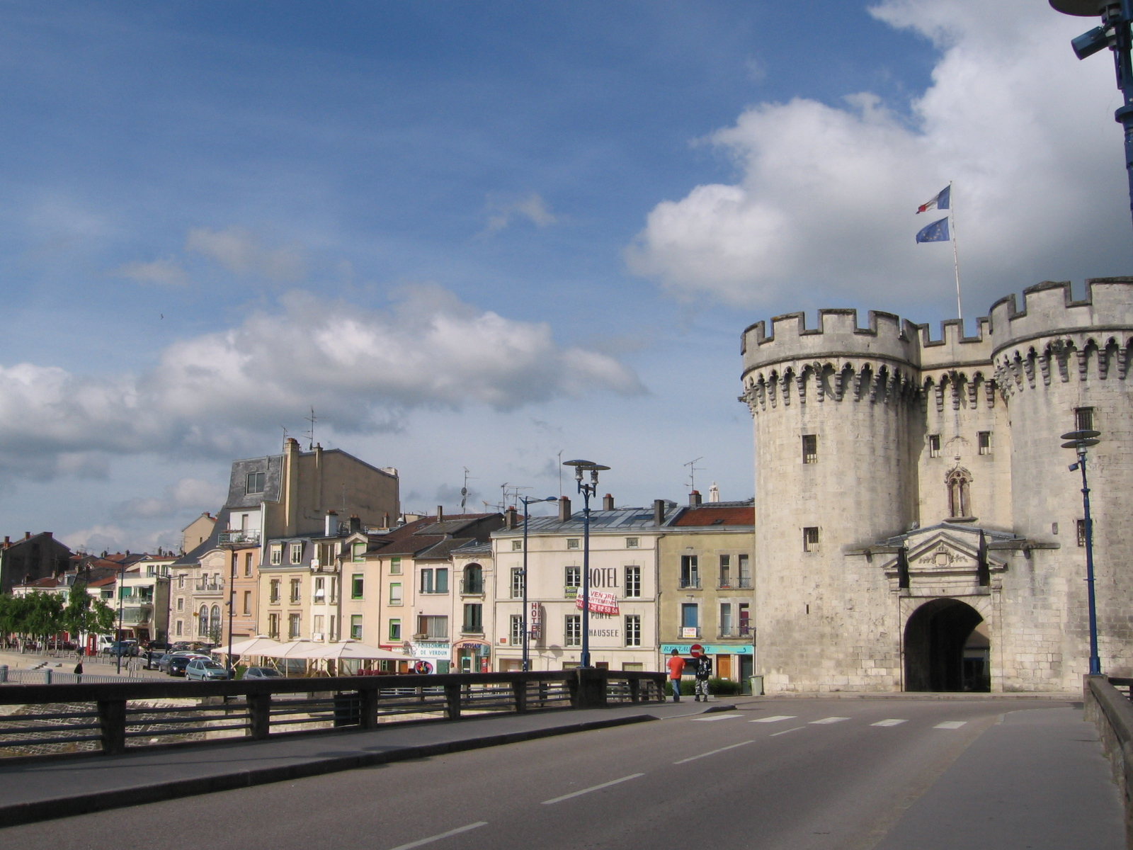 Verdun